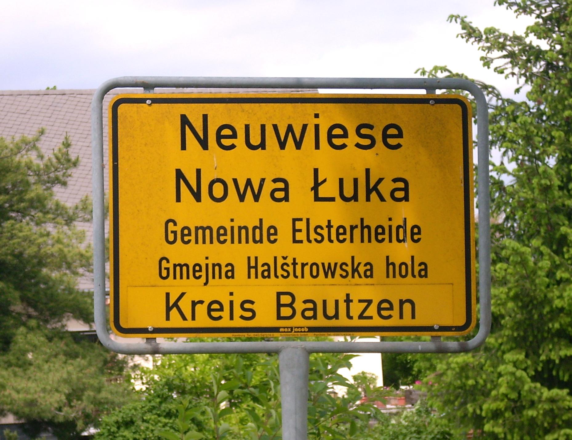 Ortsschild von Neuwiese (Elsterheide)